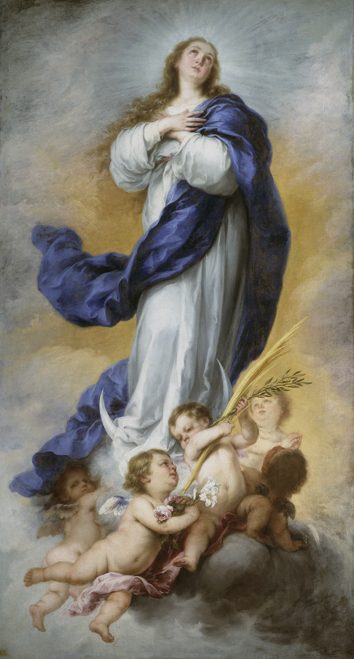 Esta obra, conocida como la Inmaculada Concepción de Aranjuez, procede del Palacio Real de Aranjuez, y es una de las cinco Inmaculadas pintadas por Bartolomé Esteban Murillo que se conservan en el Museo del Prado.